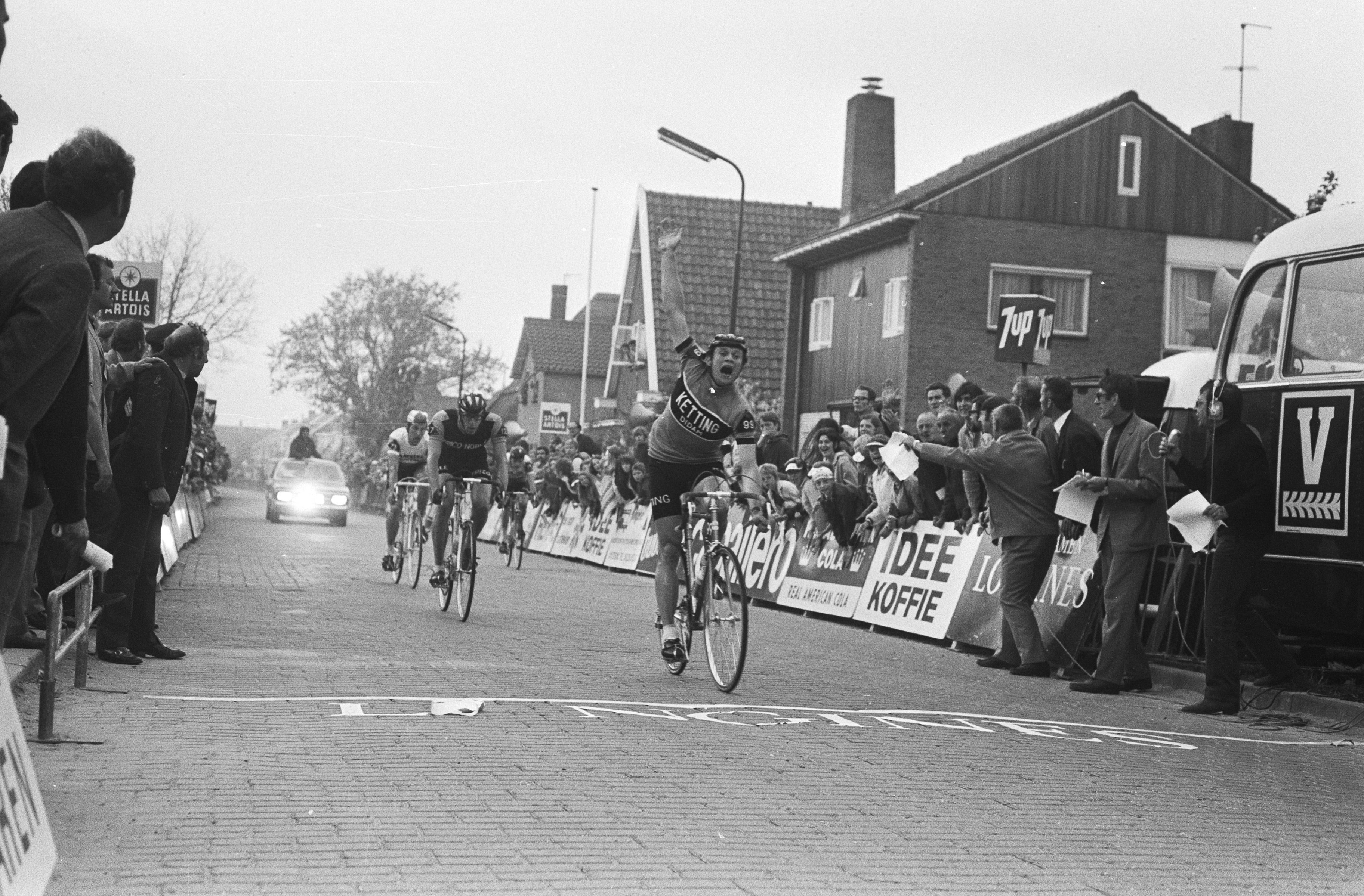 Collectie / Archief : Fotocollectie Anefo Reportage / Serie : Olympia's Ronde door Nederland Beschrijving : Klaas Balk als eerste over de finish in Wieringen Datum : 12 mei 1971 Locatie : Noord-Holland, Wieringen Trefwoorden : fietsen, sport, wielrennen, wielrenners Persoonsnaam : Balk, Klaas Instellingsnaam : Olympia's Ronde van Nederland Fotograaf : Fotograaf Onbekend / Anefo Auteursrechthebbende : Nationaal Archief Materiaalsoort : Negatief (zwart/wit) Nummer archiefinventaris : bekijk toegang 2.24.01.05 Bestanddeelnummer : 924-5463